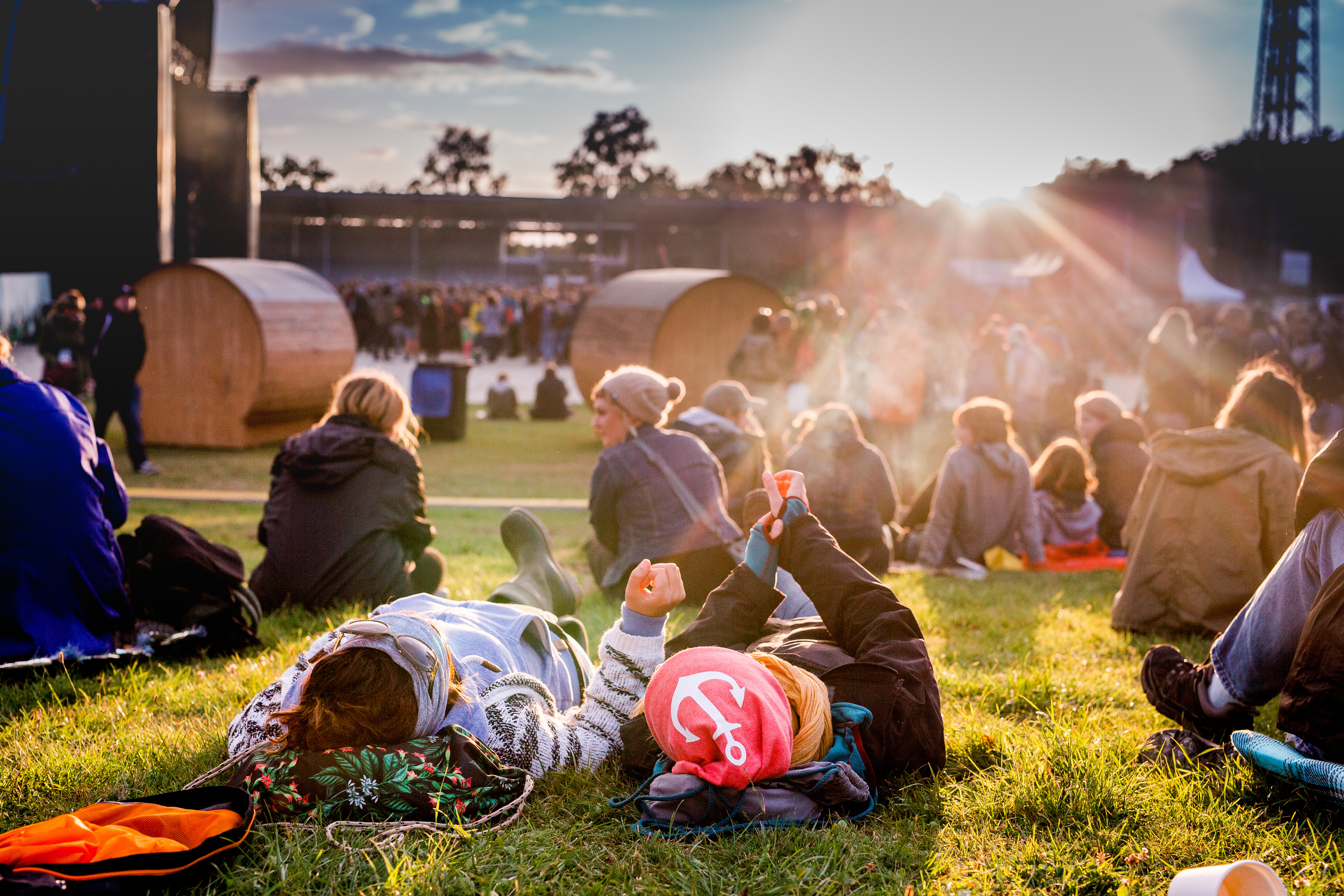 Szene vom Festivalgelände 2016.